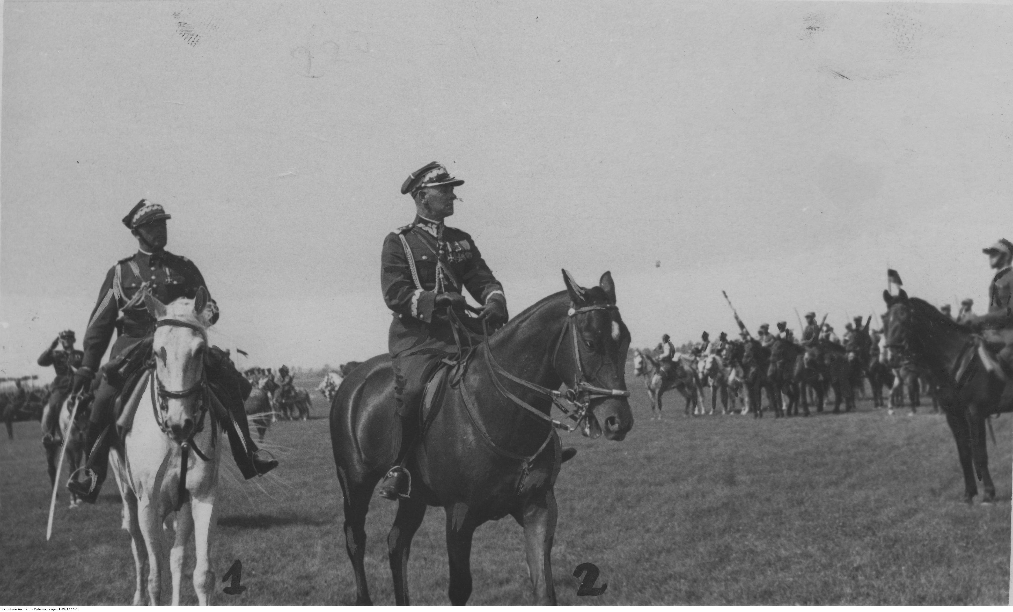 Rewia Brygady Kawalerii "Baranowicze" w Lidzie. Gen. Stanisław Grzmot-Skotnicki (1) i gen. Edward Rydz-Śmigły (2) podczas rewii. Koncern Ilustrowany Kurier Codzienny - Archiwum Ilustracji. Sygnatura: 1-W-1350-1